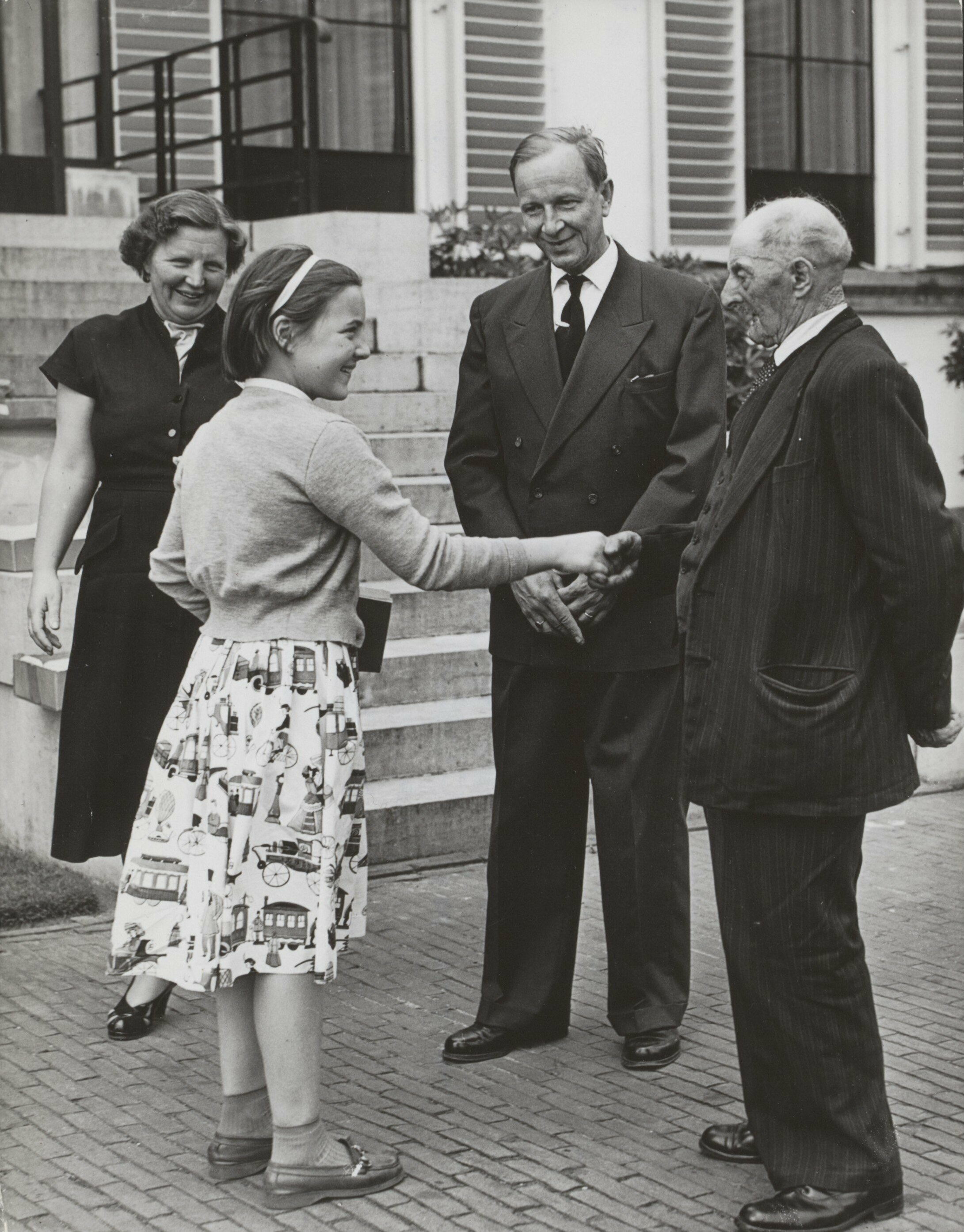 Collectie / Archief : Fotocollectie Elsevier Reportage / Serie : [ onbekend ] Beschrijving : koninklijk huis, prinsessen, koninginnen, begroetingen, bejaarden, defiles, Dalen, H. van, Juliana, koningin, Margriet, prinses, Ottow, S.J. Datum : 22 juni 1955 Trefwoorden : begroetingen, bejaarden, defiles, koninginnen, koninklijk huis, prinsessen Persoonsnaam : Dalen, H. van, Juliana, koningin, Margriet, prinses, Ottow, S.J. Fotograaf : Fotograaf Onbekend / Anefo Auteursrechthebbende : Nationaal Archief Materiaalsoort : Foto (zwart/wit) Nummer archiefinventaris : bekijk toegang 2.24.05.02 Bestanddeelnummer : 018-1049